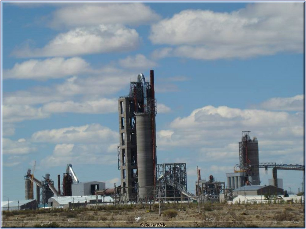 Cementera Pico Truncado a la vista